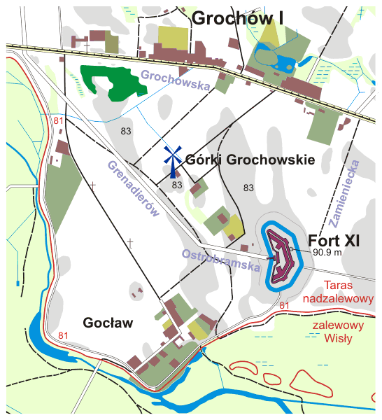 Wieś Górki Grochowskie i Fort XI zaborowej Twierdzy Warszawa - mapa.